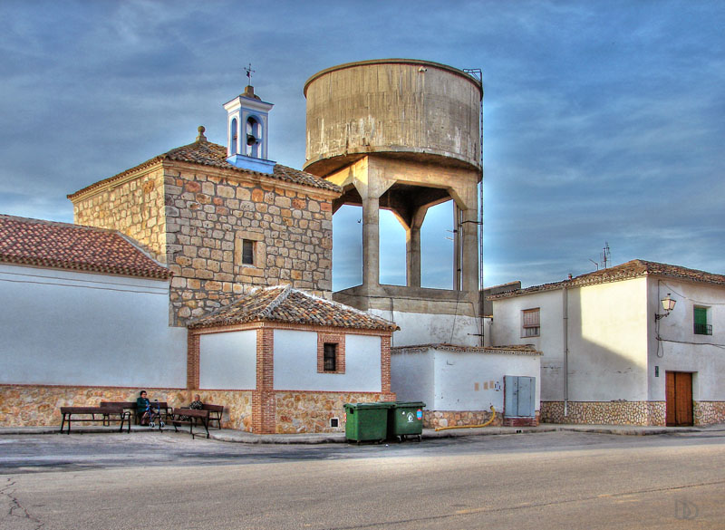 Ermita de San Sebastián y Pozo de El Toboso